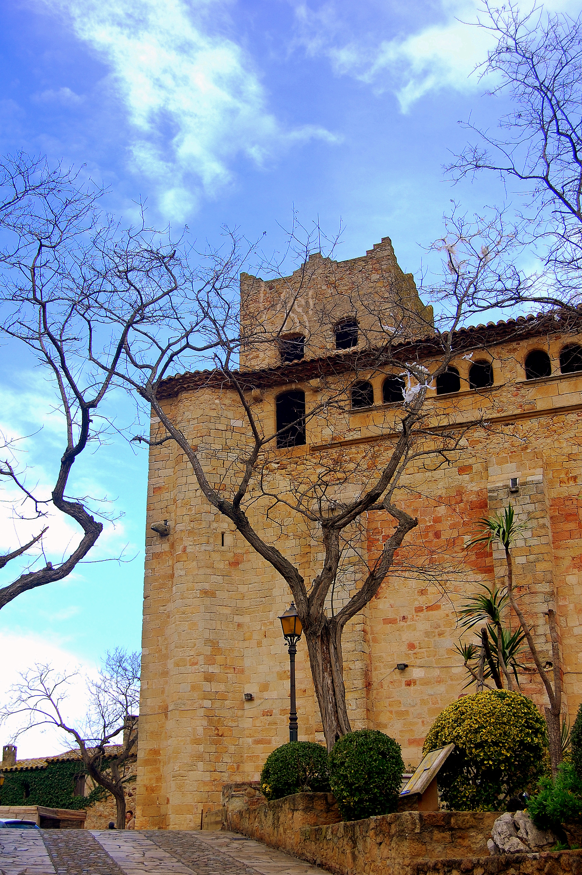 Església de Sant Pere de Pals (Pals)